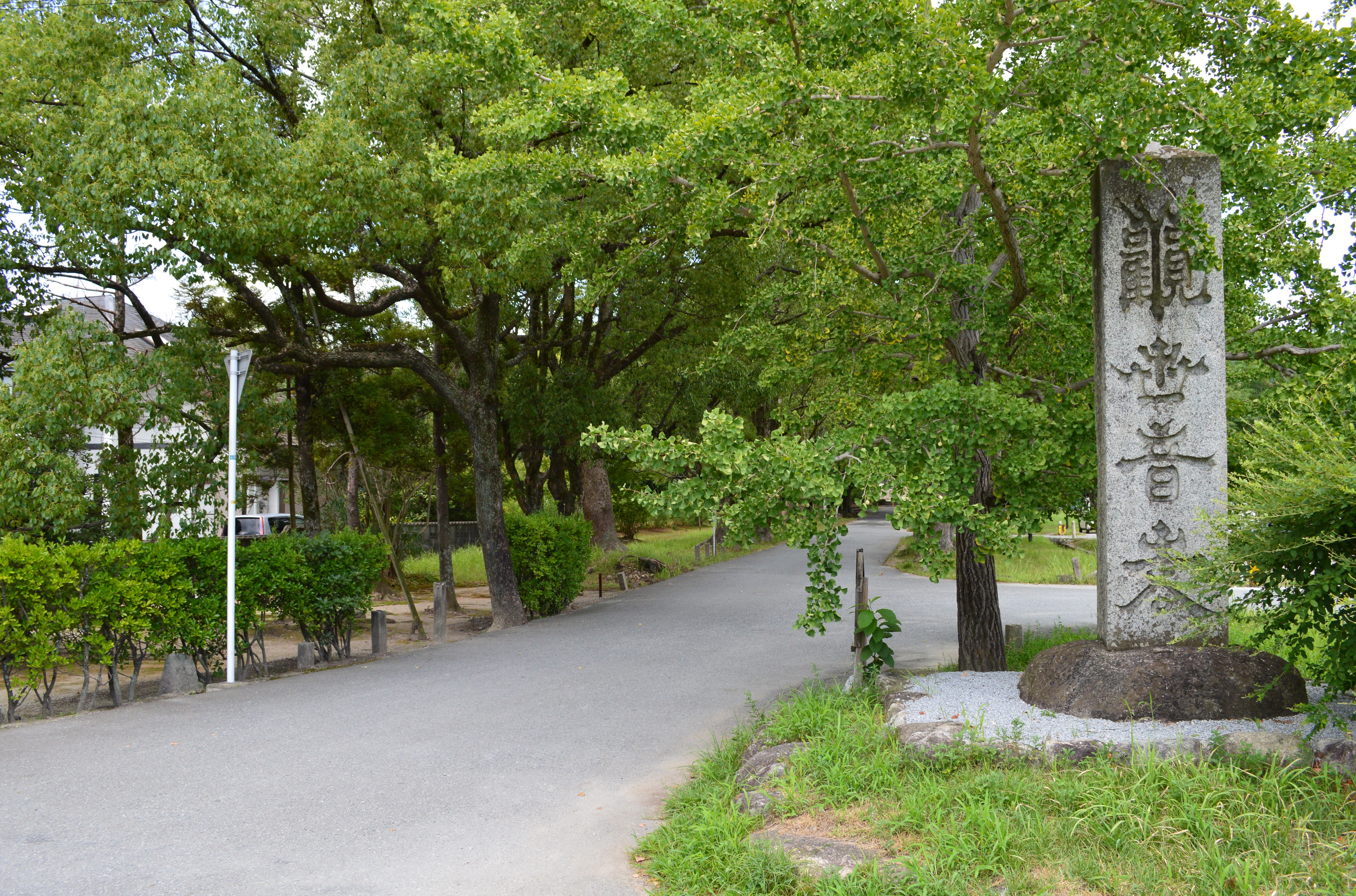 観世音寺 (太宰府市) 境内入り口